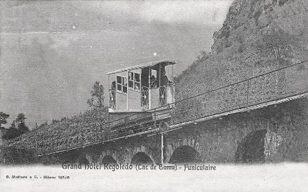 Cartolina funicolare di Regoledo